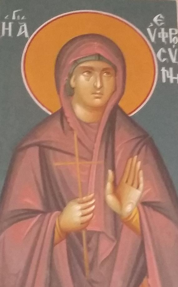 Αγία Ευφροσύνη